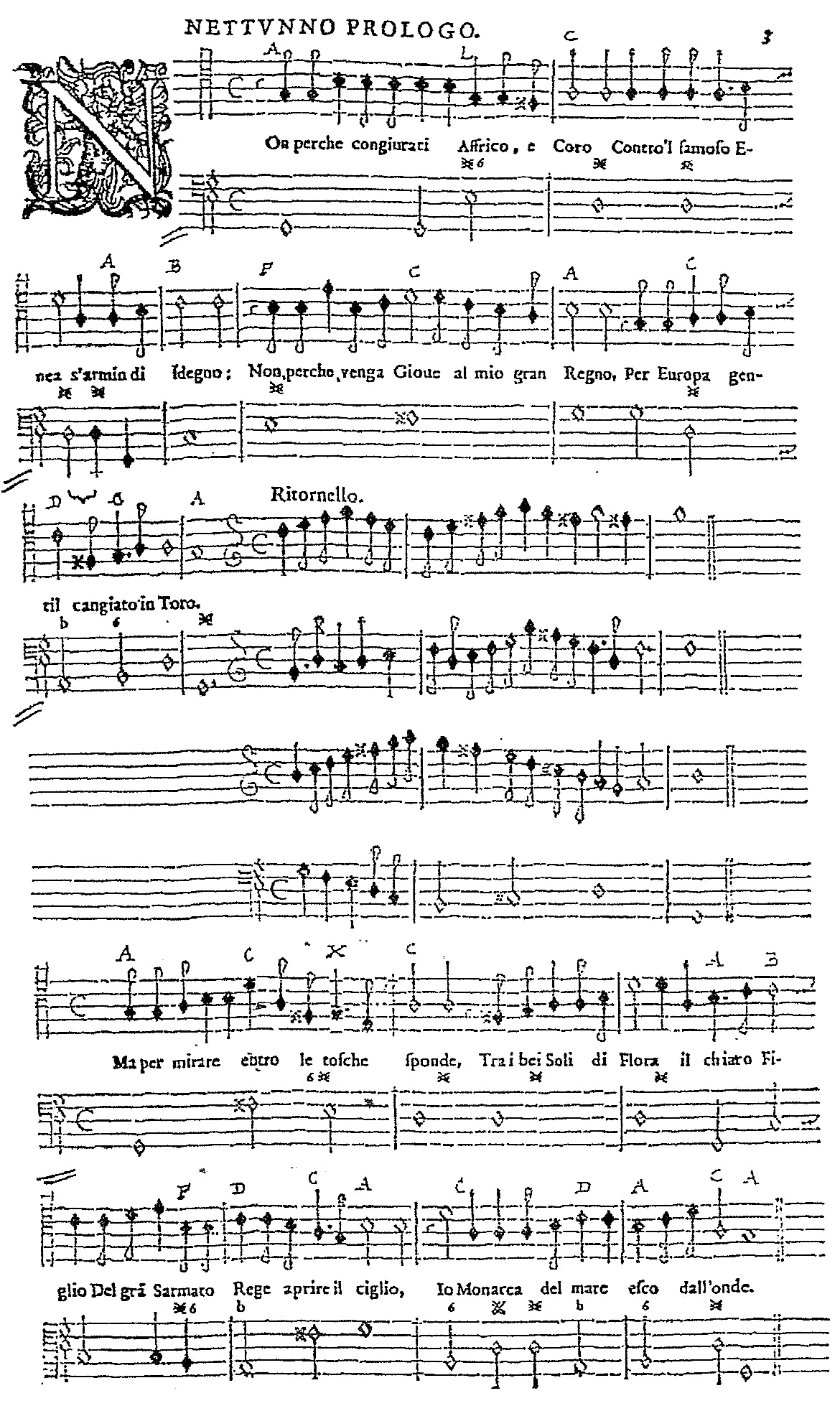 Francesca Caccini - La liberazione di Ruggiero dall'isola d'Alcina - Prologue